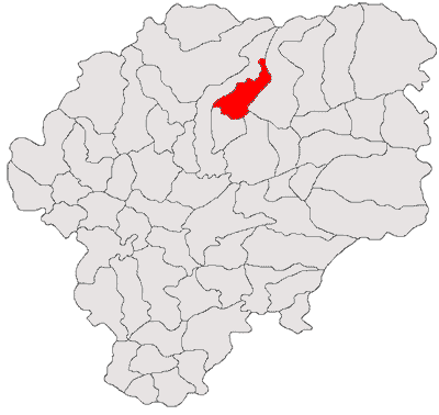 Categorie:Hărţi ale judeţului Bistriţa-Năsăud